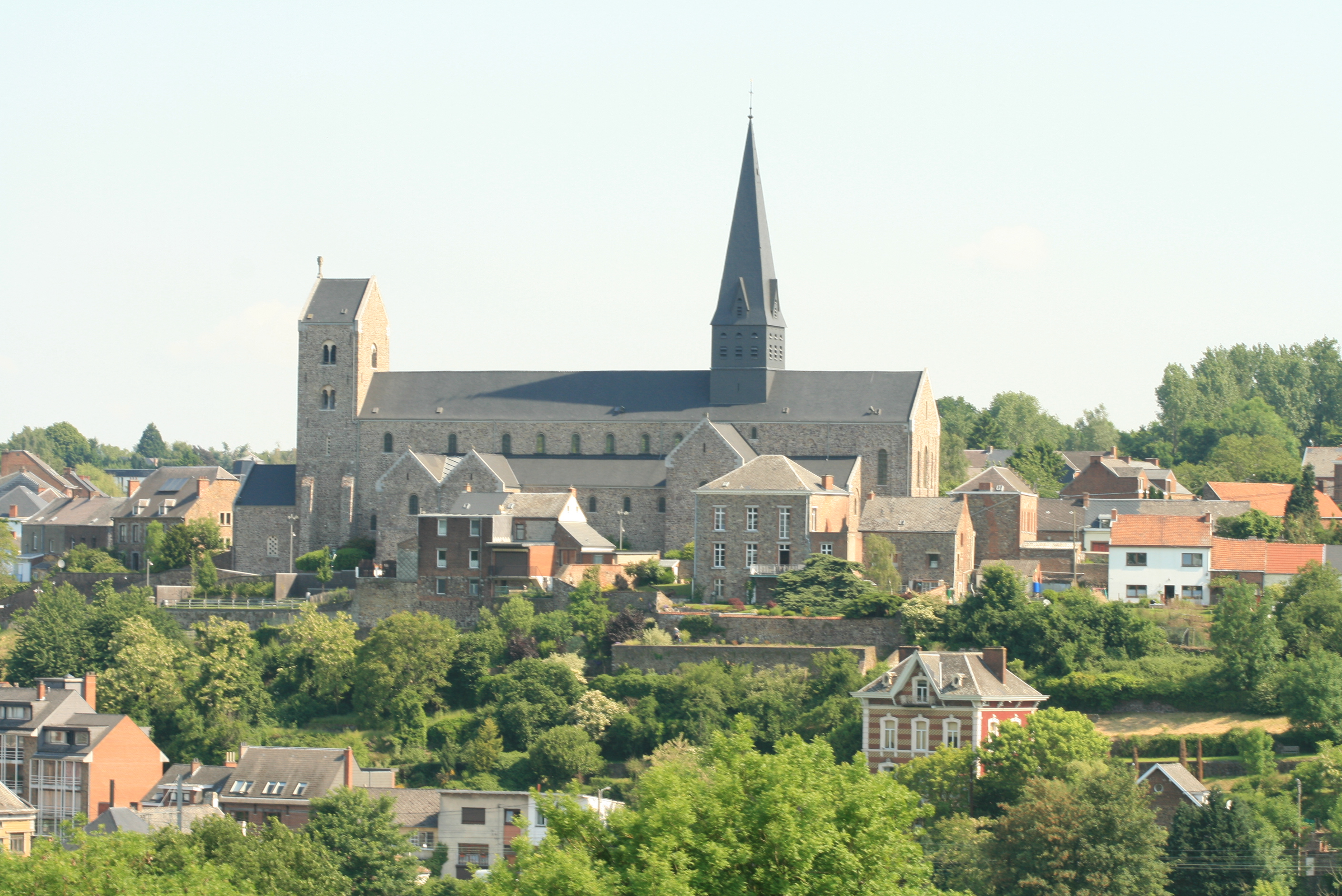 Lobbes, Hainaut, Belgique